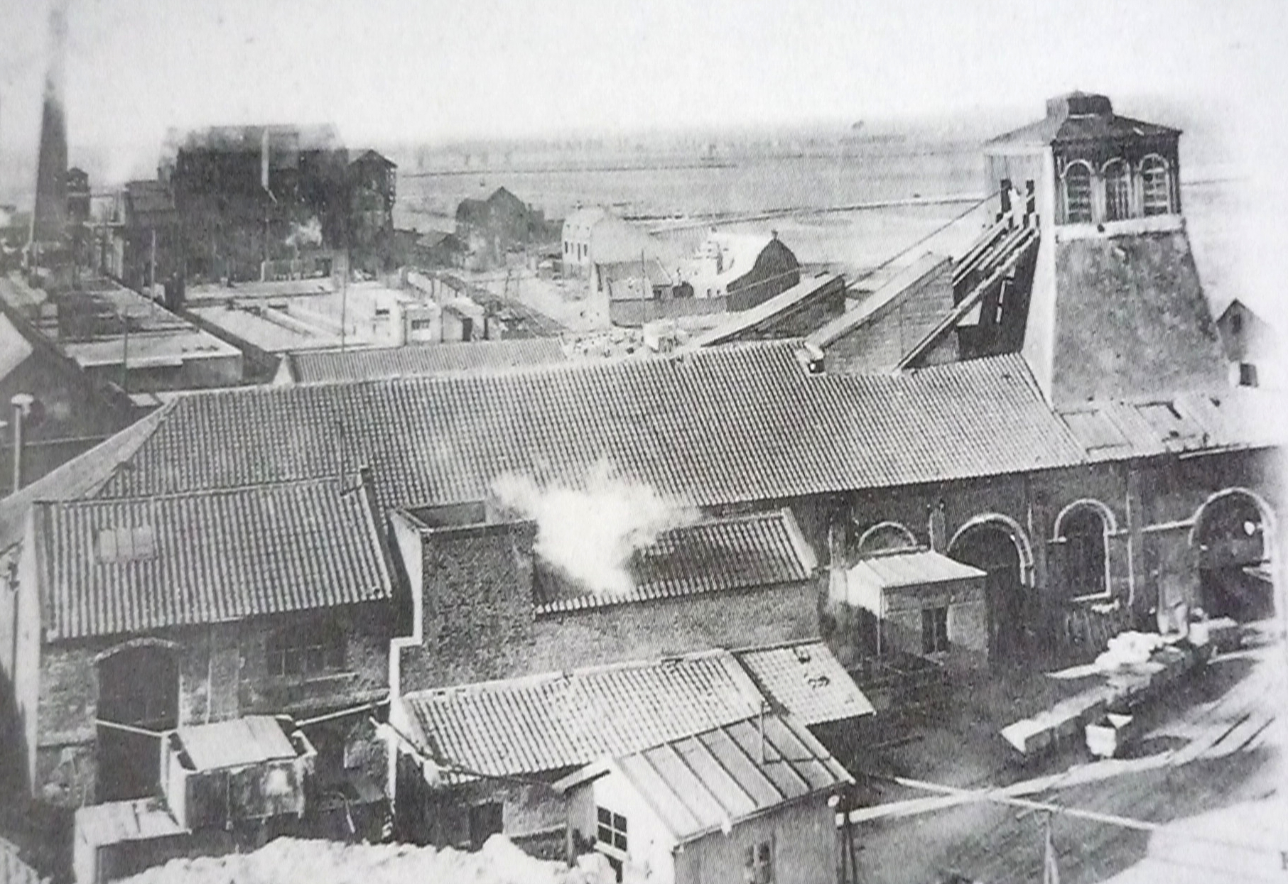 La Fosse n° 1 dite Saint Roch de la Compagnie des mines d'Azincourt était un charbonnage constitué d'un seul puits situé à Monchecourt, Nord, Nord-Pas-de-Calais, France.